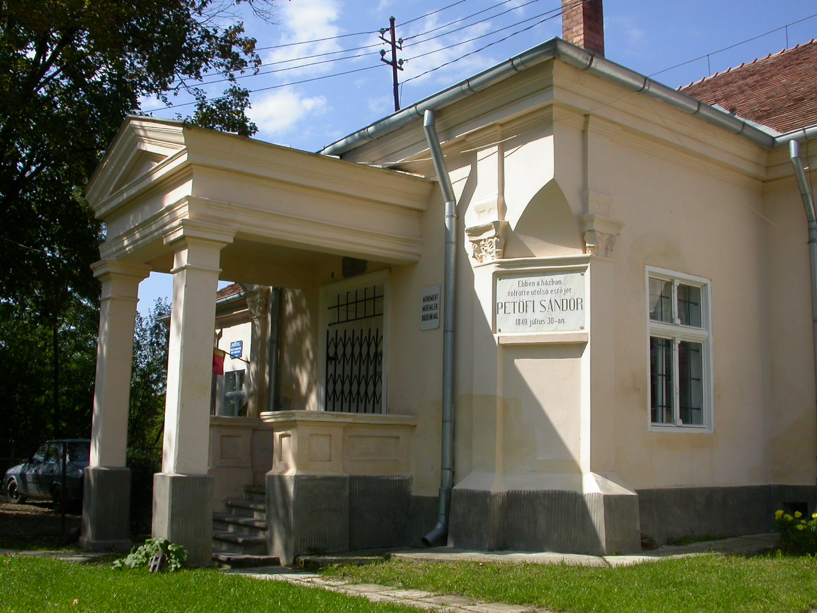 Conacul Gyárfás, sec. XVIII 01